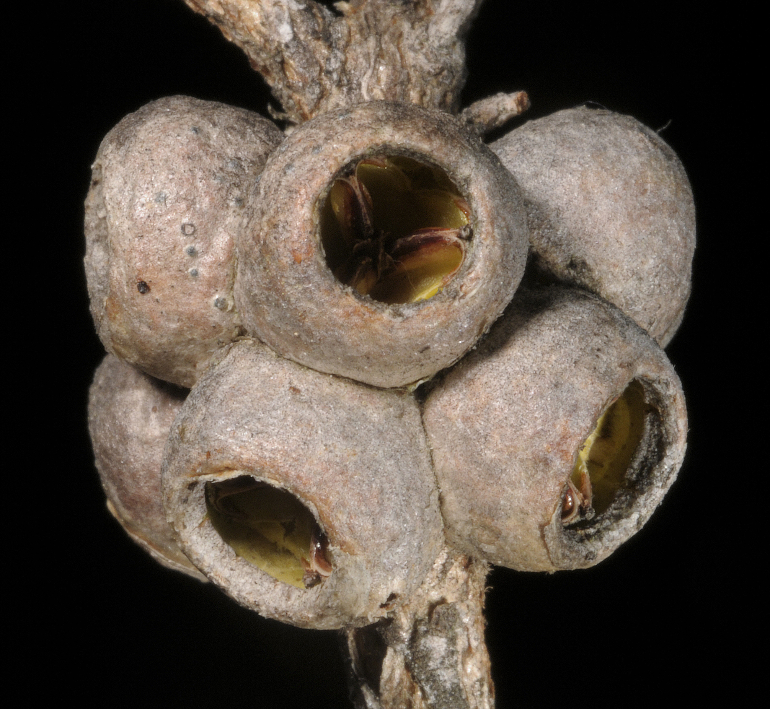 KRT3930